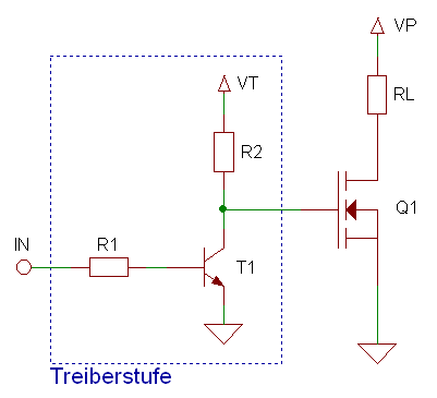 Einfacher Gate-Treiber